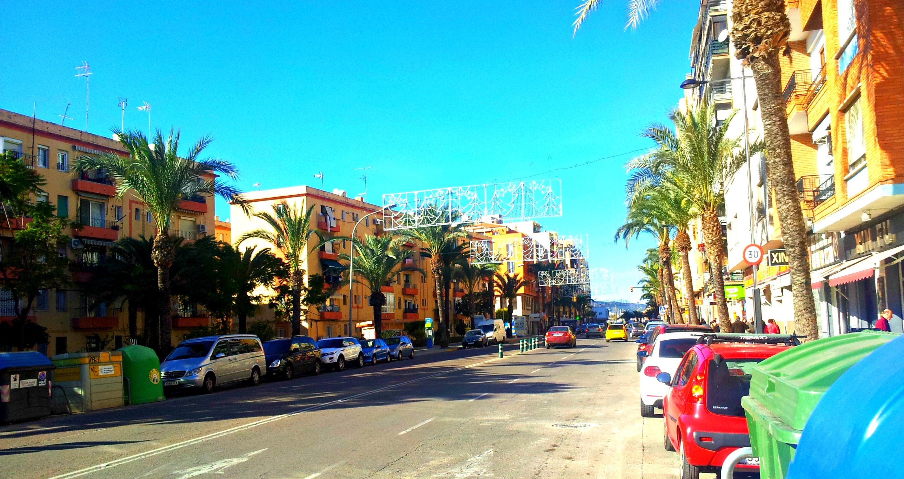 Vista de l'avinguda de la Hispanitat, centre neuràlgic del Port de Sagunt.